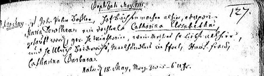 Kirchenbuch